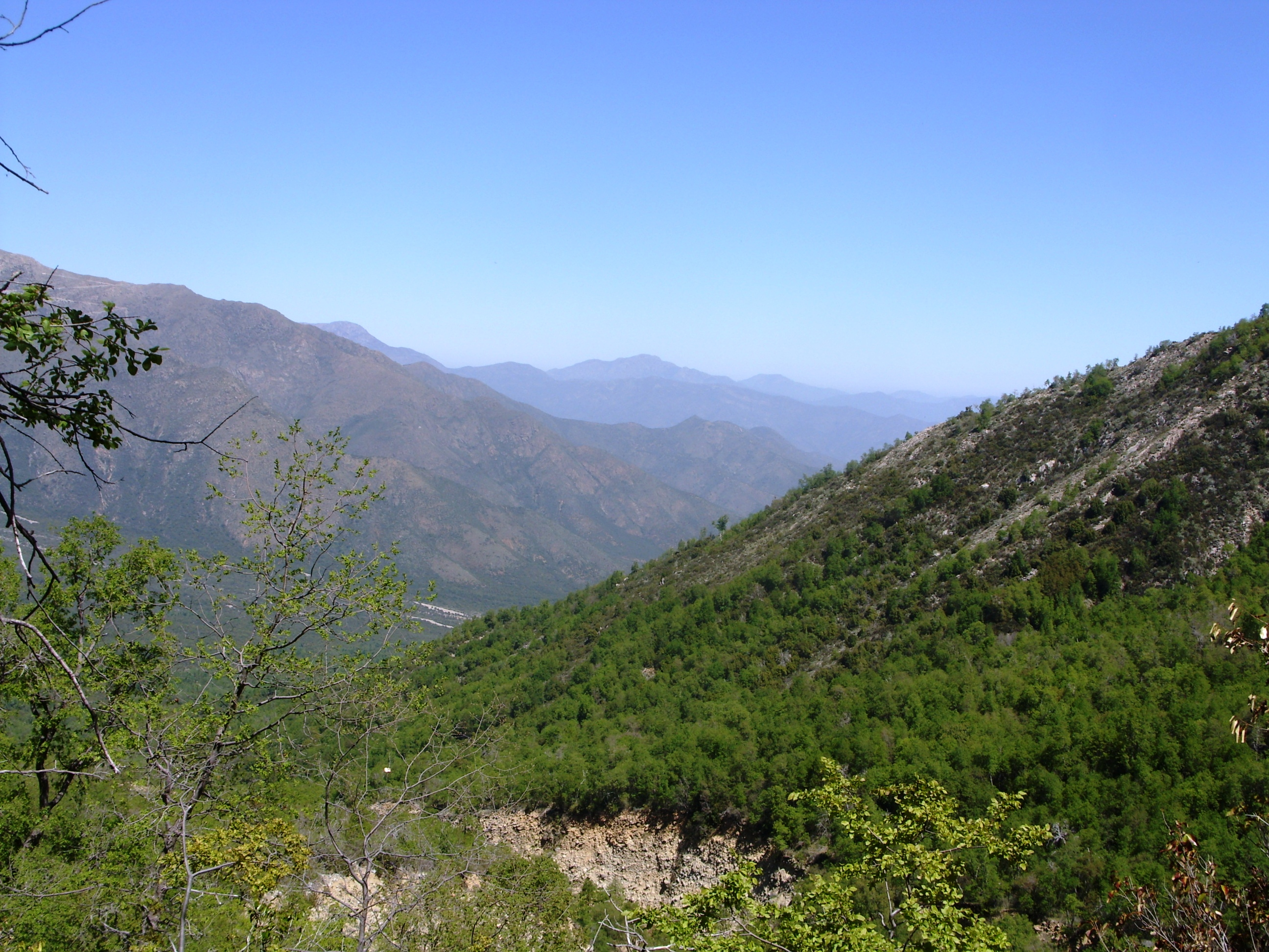 A alto Cantillana desde el Sur